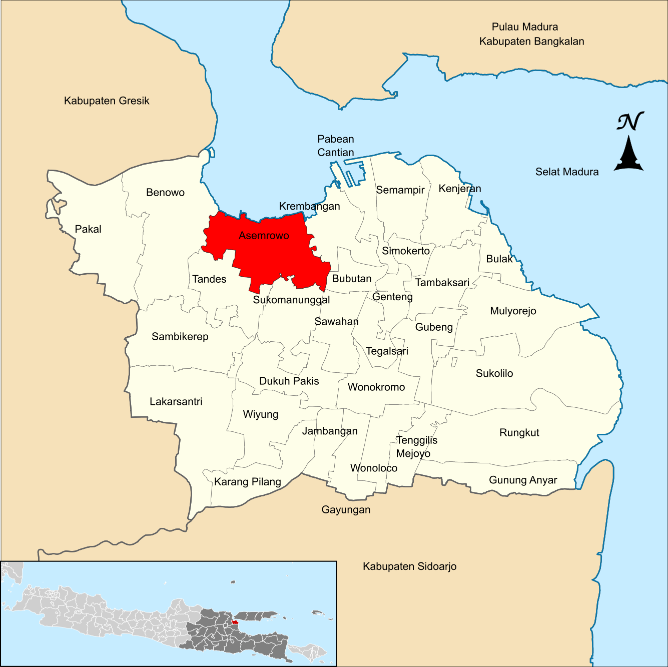 Localização de Asemrowo na cidade de Surabaia